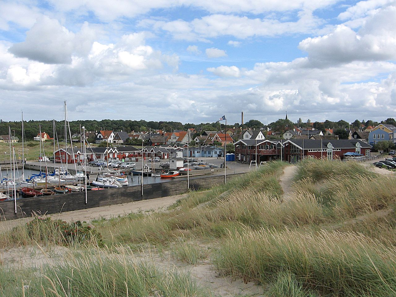 Hornbaek, Denmark